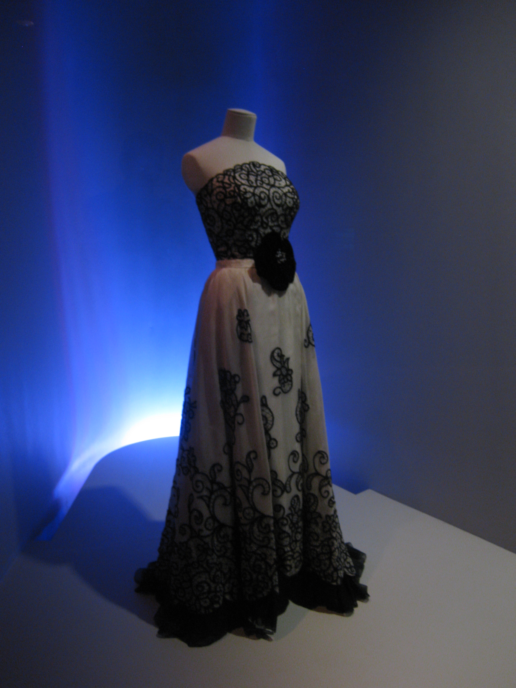 Exposició Balenciaga y la alta costura en Barcelona, proximidades y distancias. Col·lecció tèxtil Antoni de Montpalau